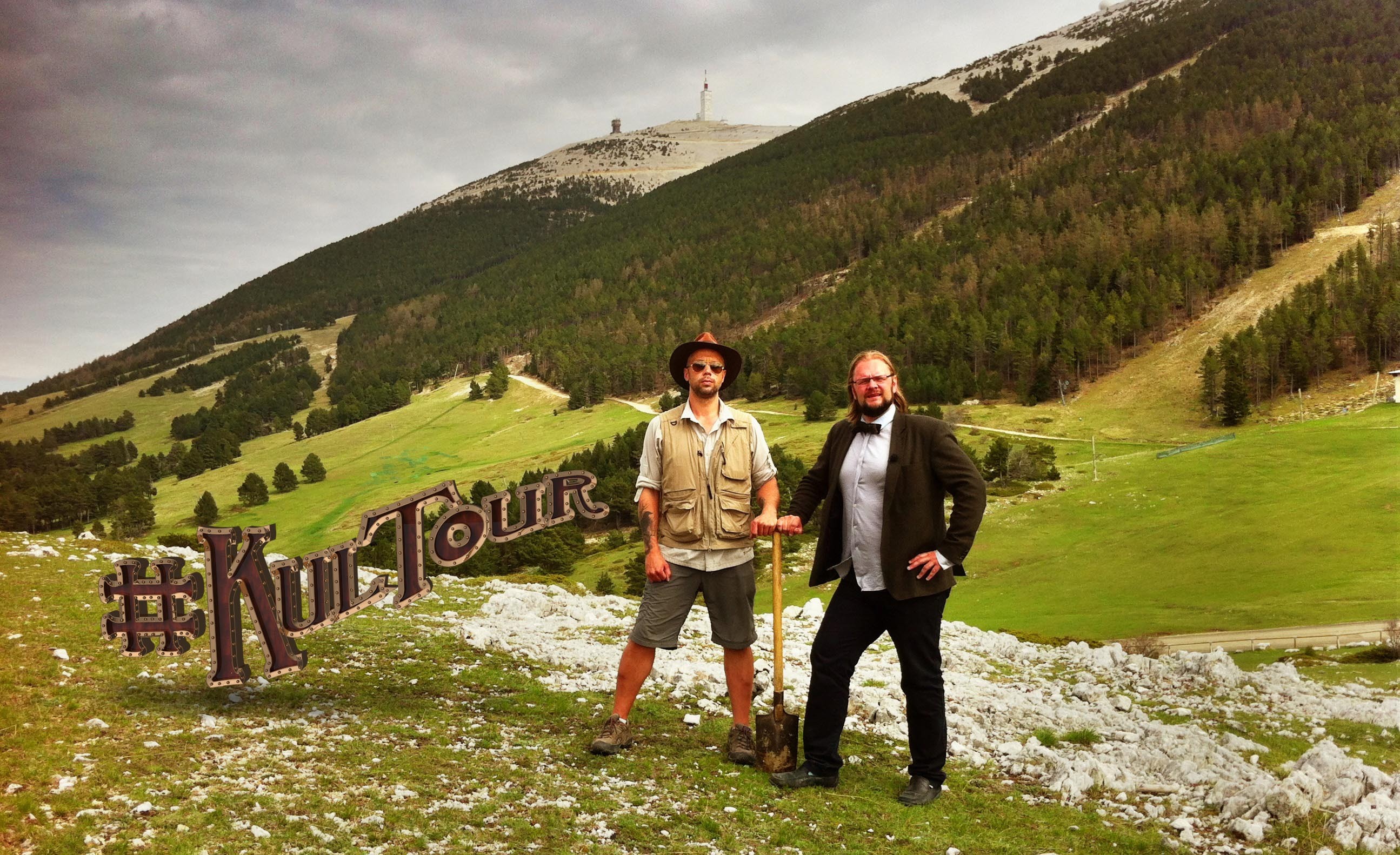 Tittelplakat for KulTour sesong 7